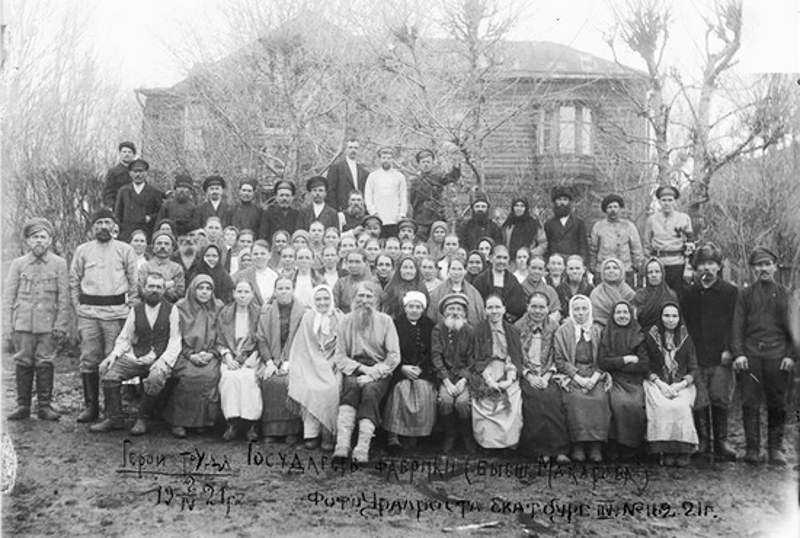 Работники фабрики Братьев Макаровых. 02.04.1921